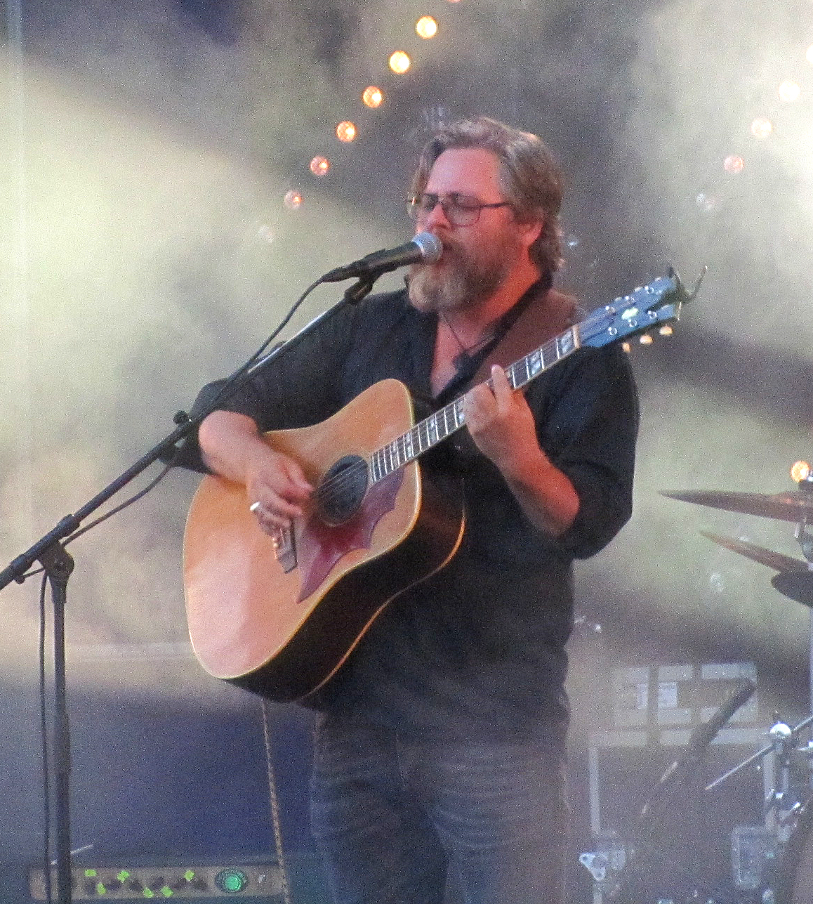 Søren Huss fra Sabyia i Tivoli Friheden, Aarhus